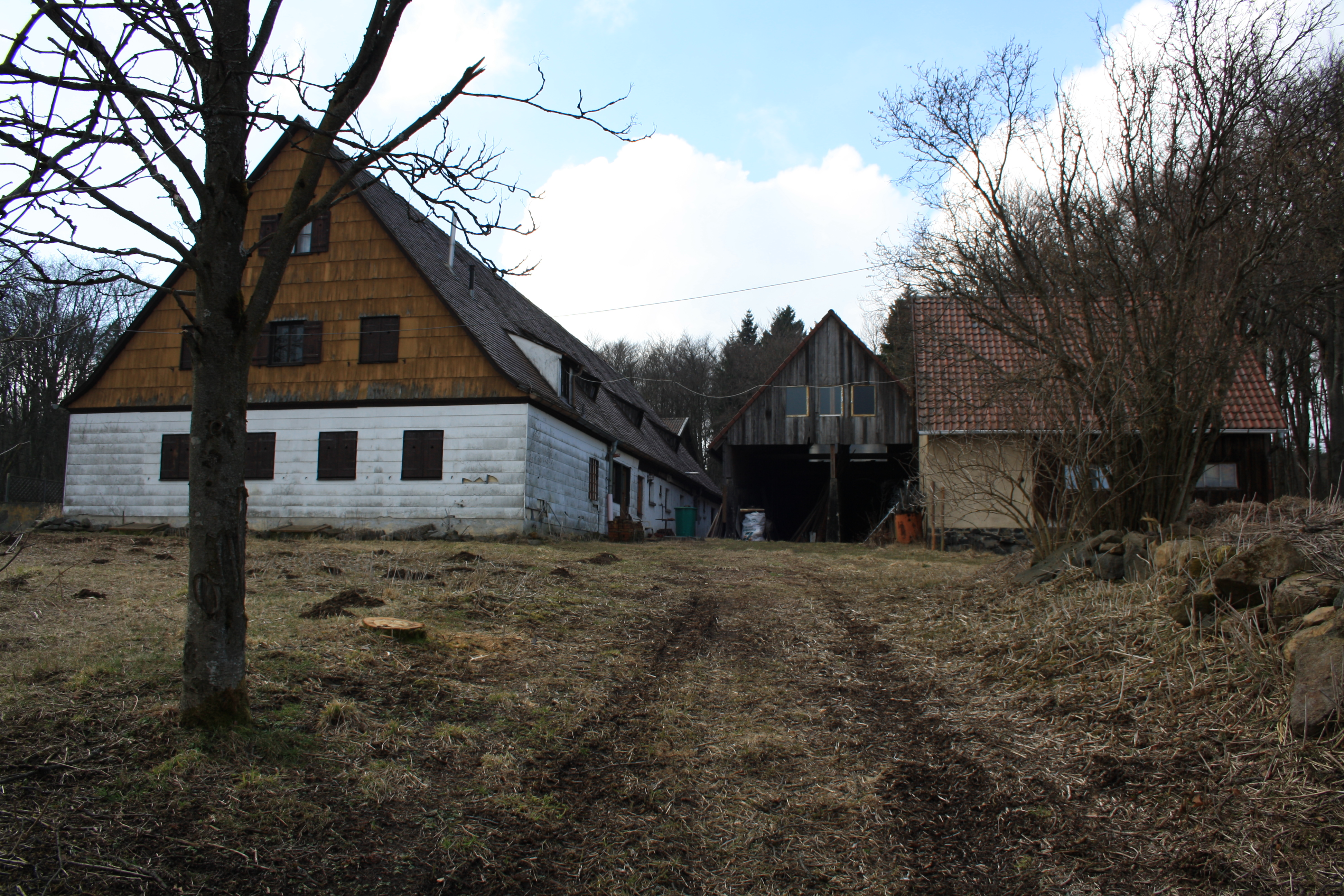 Rhönhof